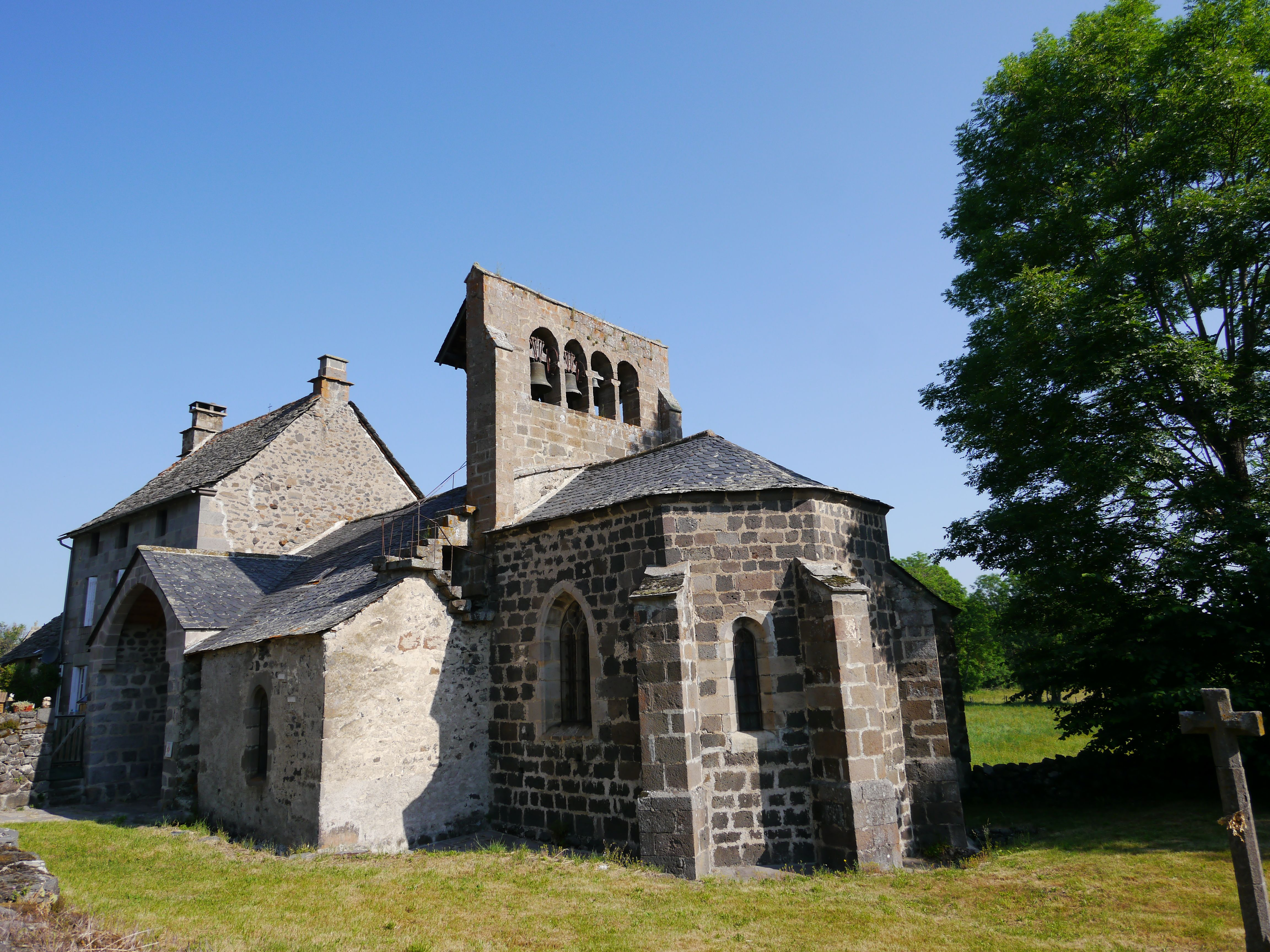 Construite avant le Xème siècle